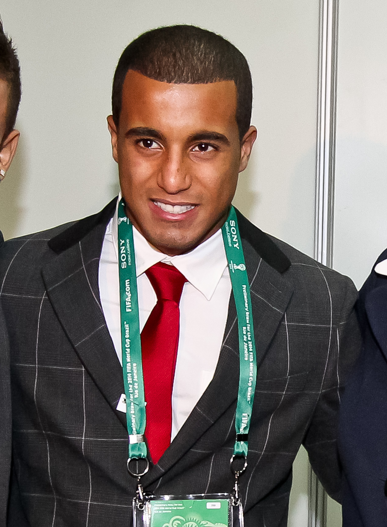 Presidenta Dilma Rousseff posa para foto com os jogadores Neymar, Lucas e Ganso após a cerimônia de sorteio preliminar da Copa do Mundo (Rio de Janeiro,RJ,30/07/2011) Foto: Roberto Stuckert Filho/PR